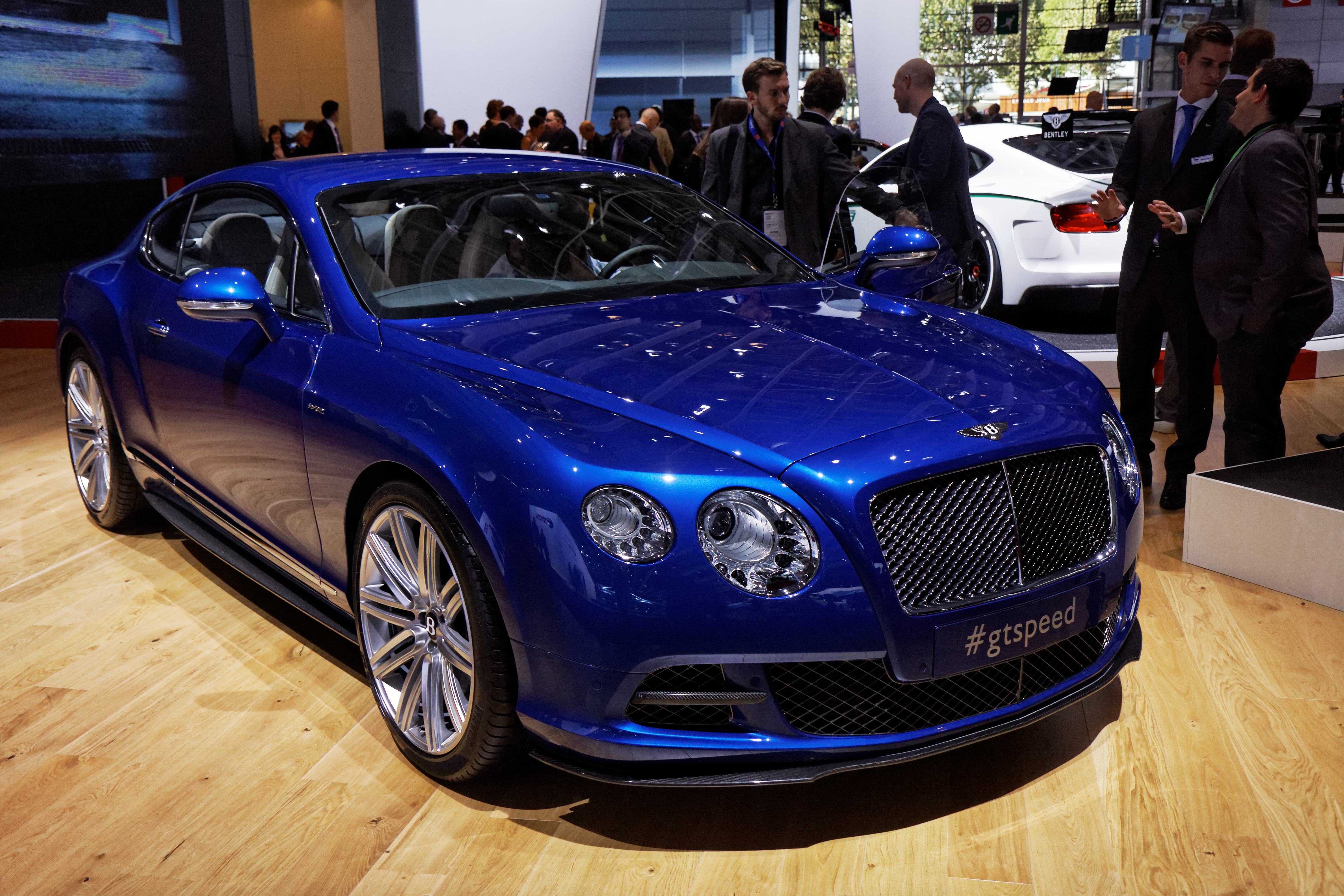 Une Bentley GT Speed présentée lors du Mondial de l'Automobile de Paris 2012.